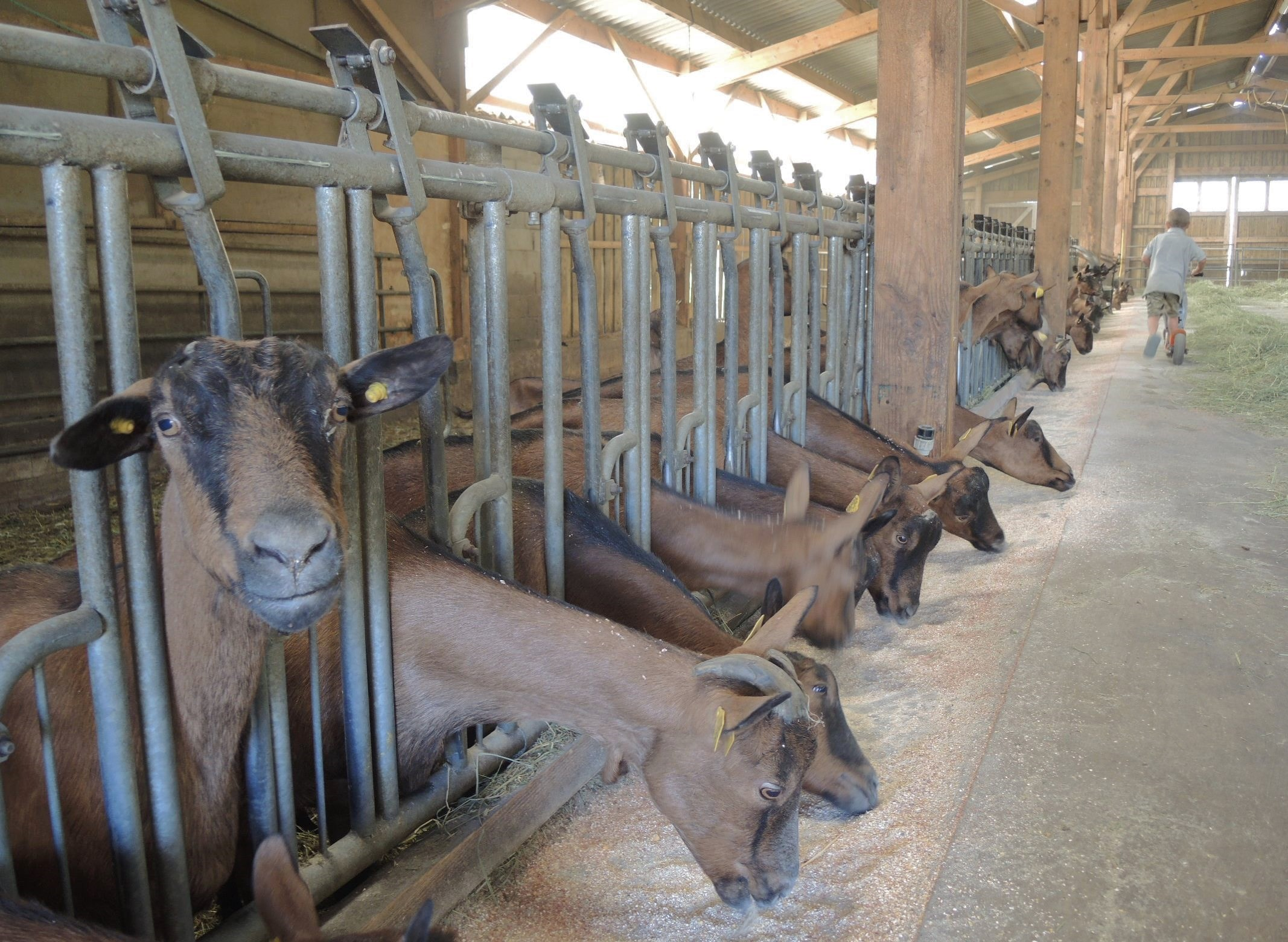 Vinzieux détail